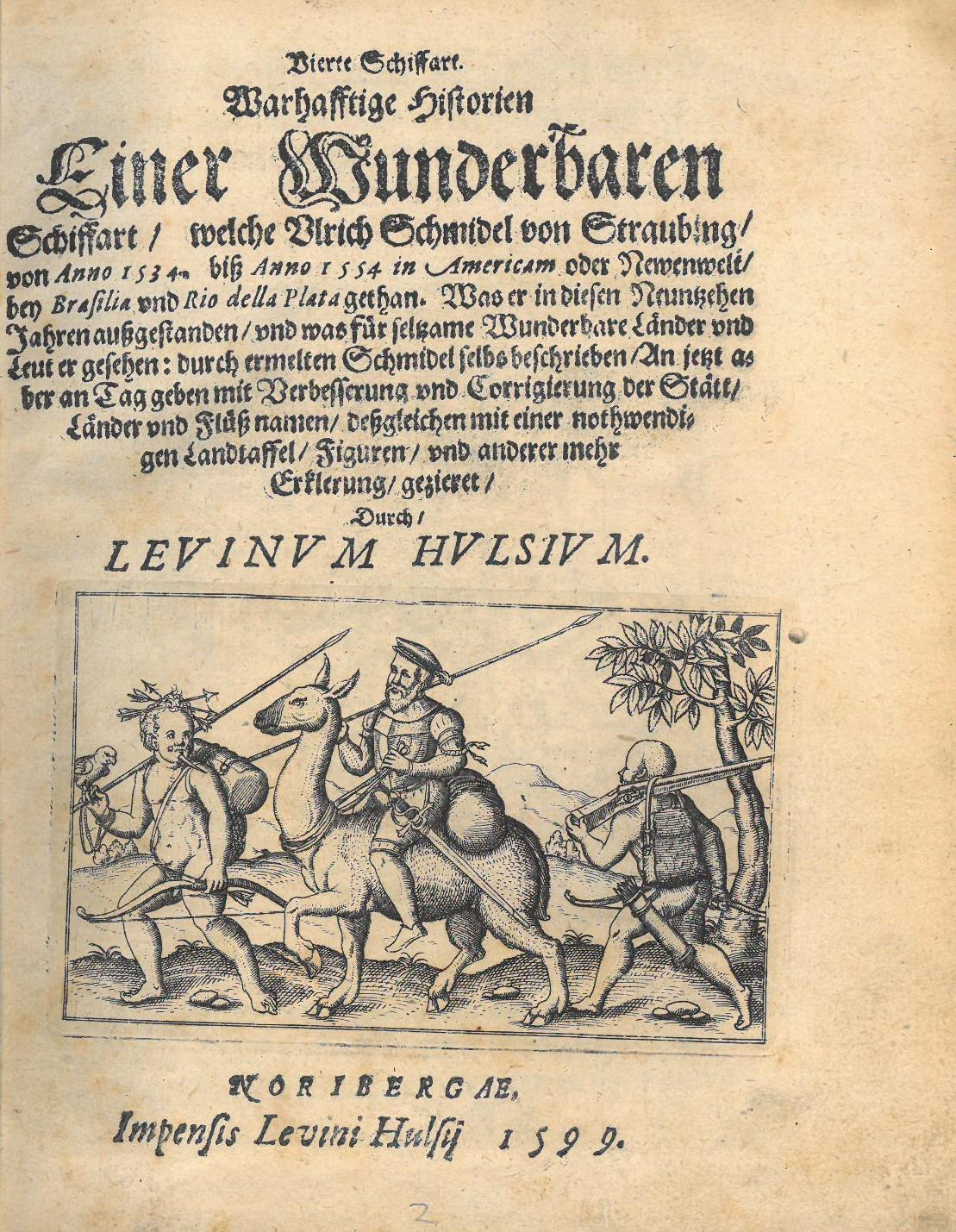 Deitsch: Titelblatt von Schmidls Reisebeschreibung in der Ausgabe von Leopold Hulsius (Gäubodenmuseum Straubing)